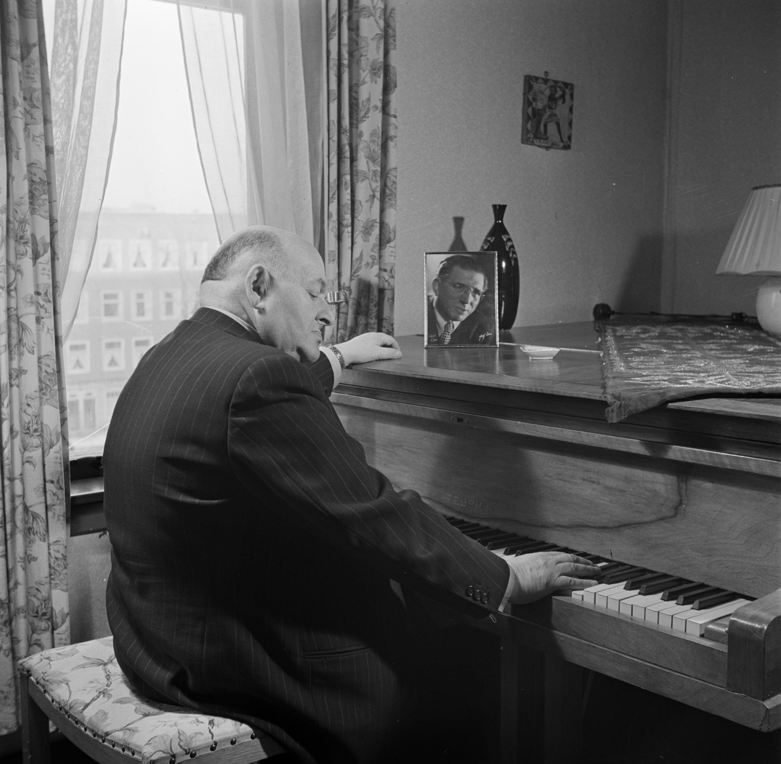 Collectie / Archief : Fotocollectie Van de Poll Reportage / Serie : Rudolf Nelson viert 75ste verjaardag Beschrijving : Duitse cabaretier en componist Rudolf Nelson (April 4, 1878—Februari 5, 1960) achter een vleugel Datum : 1 oktober 1952 Locatie : Amsterdam, Nederland, Noord-Holland Trefwoorden : cabaretiers, componisten, interieurs, pianisten Persoonsnaam : Nelson, Rudolf Fotograaf : Poll, Willem van de Auteursrechthebbende : Nationaal Archief Materiaalsoort : Negatief (zwart/wit) Nummer archiefinventaris : bekijk toegang 2.24.14.02 Bestanddeelnummer : 252-0257